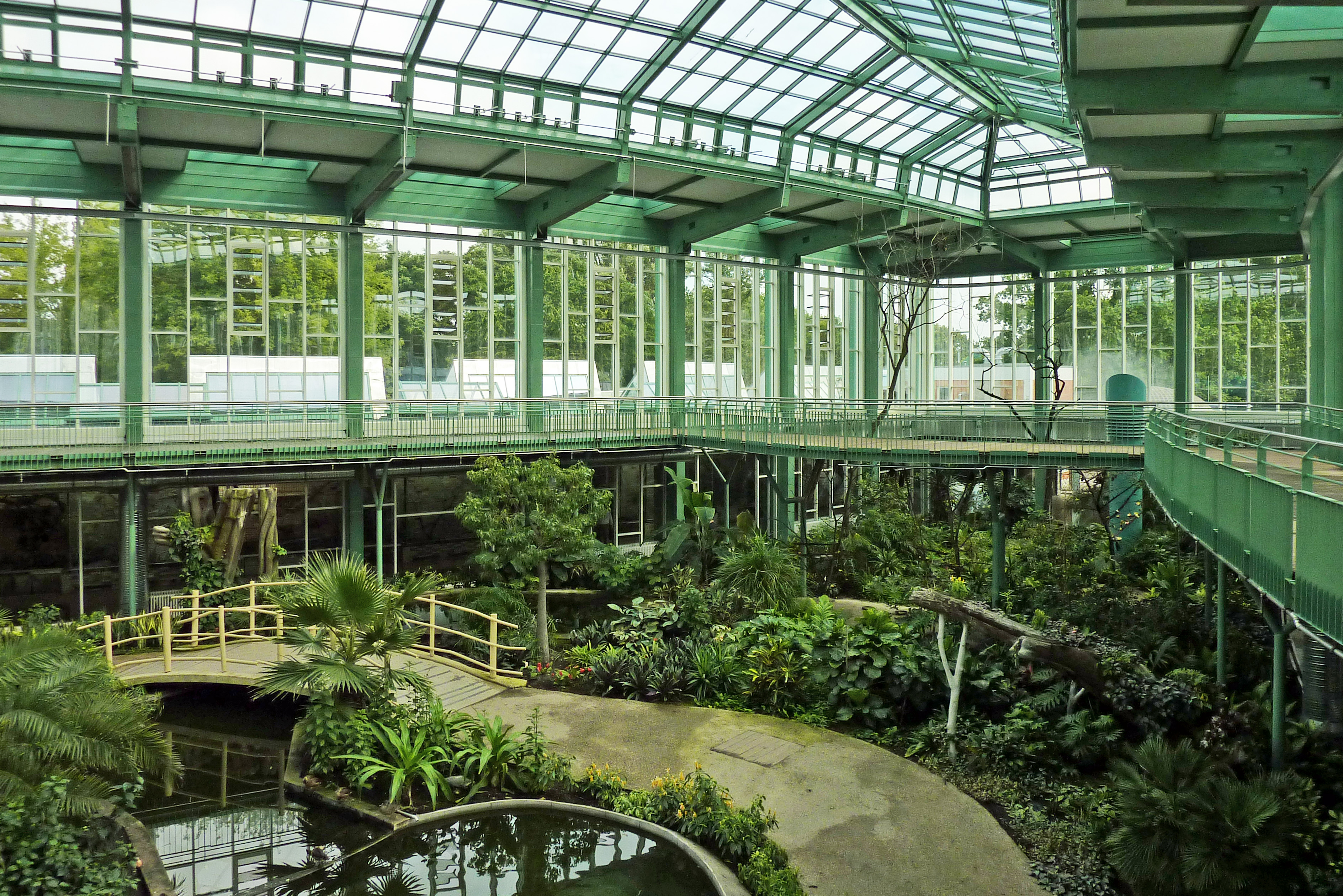 Die energetisch sanierte Tropenhalle im Alfred-Brehm-Haus des Tierparks Berlin-Friedrichsfelde, vier Monate nach ihrer Wiedereröffnung. Neu ist die Wandelgalerie in drei Metern Höhe.